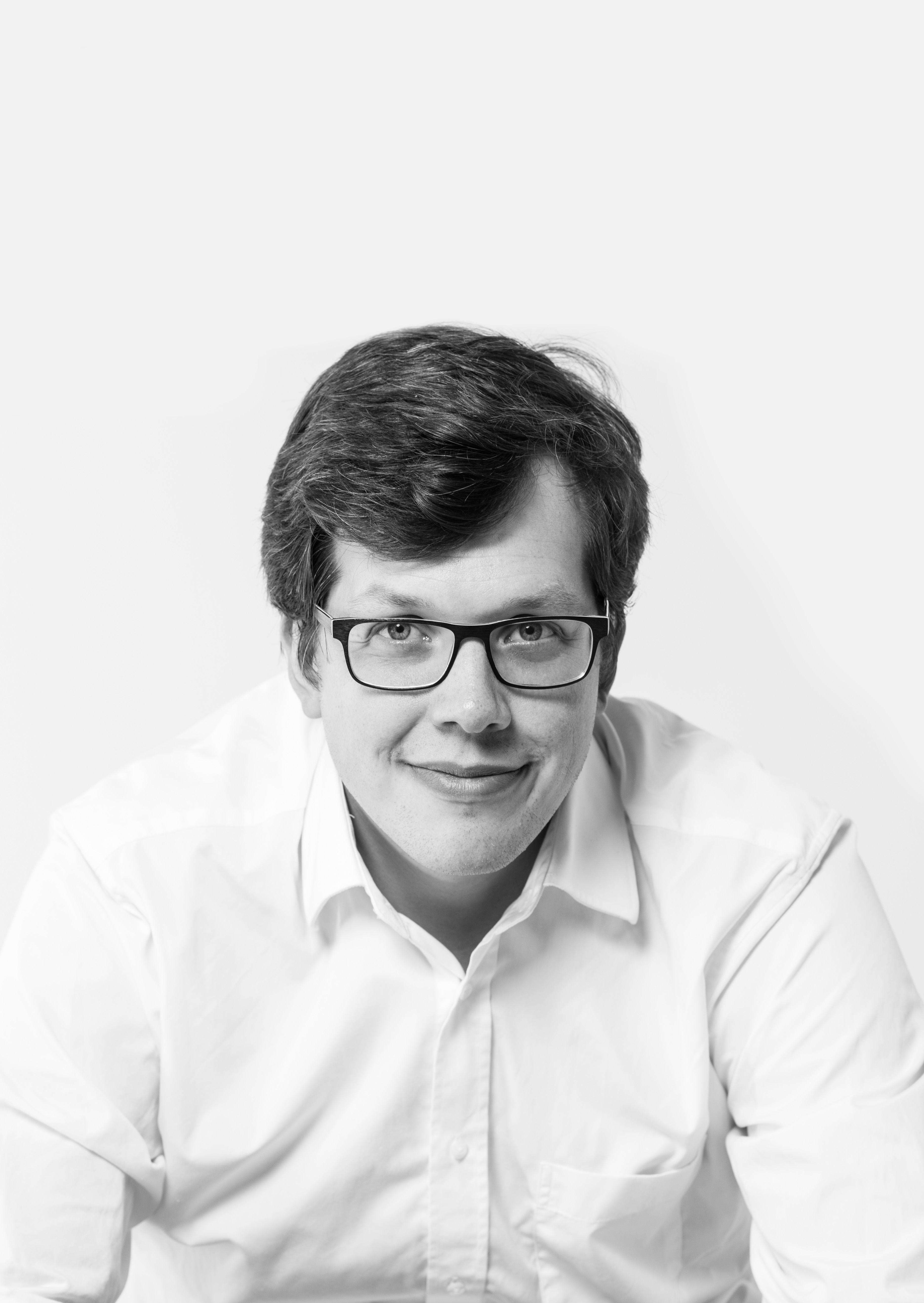 Dr. Lukas Köhler MdB (FDP)